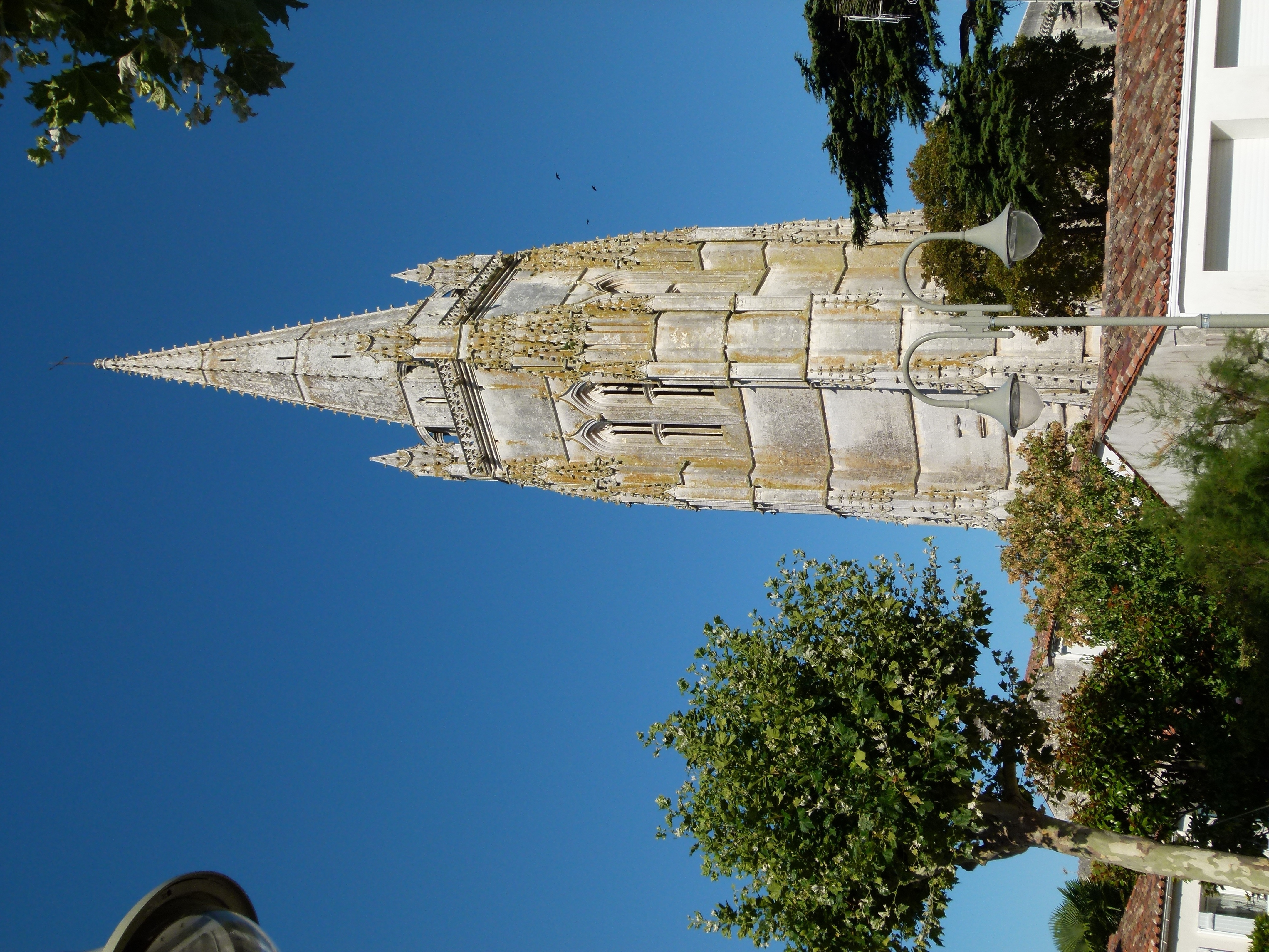 Une autre vue du clocher-porche de l'église Saint-Pierre-de-Sales à Marennes (17).